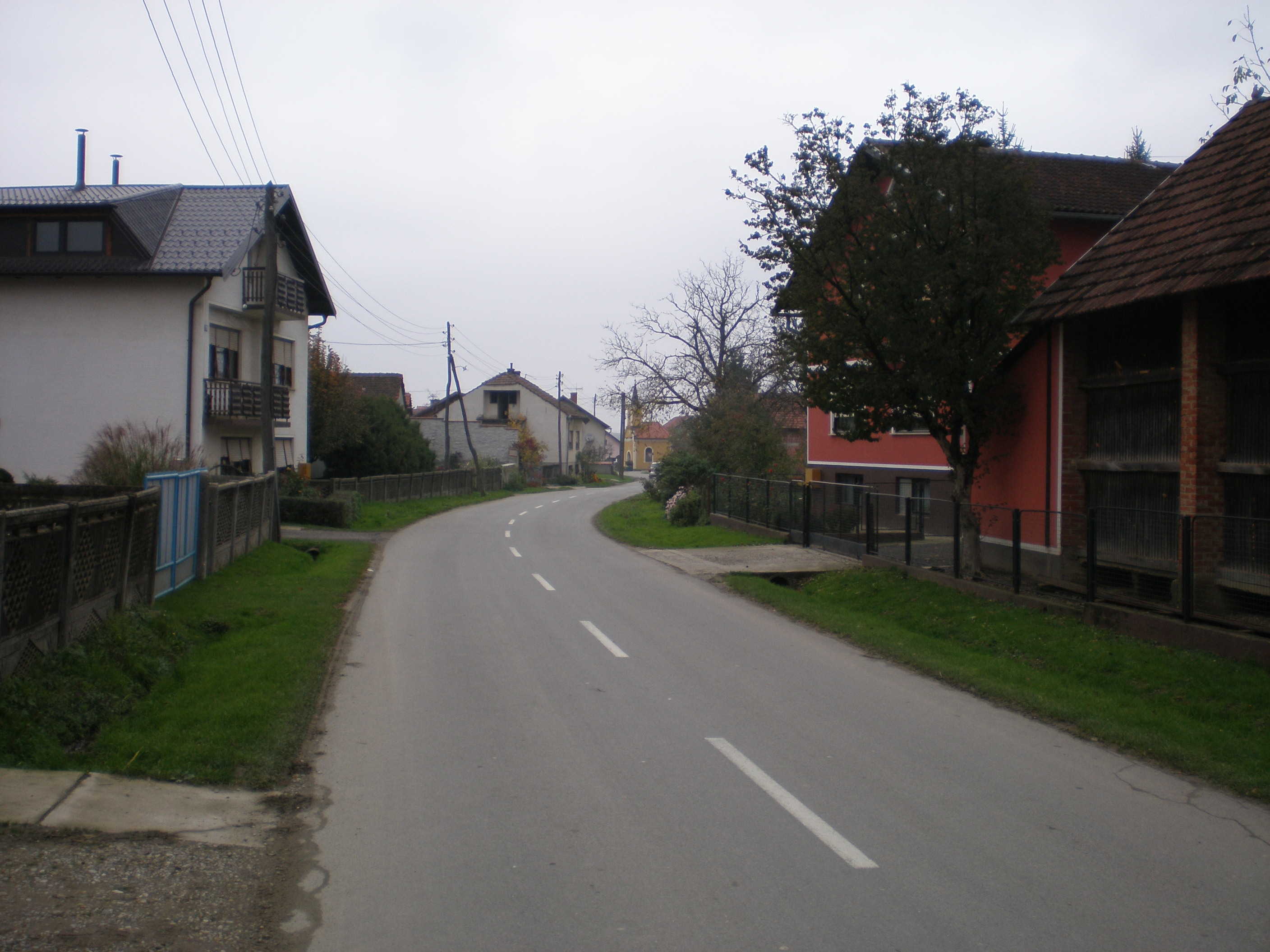 Imbriovec Jalžabetski